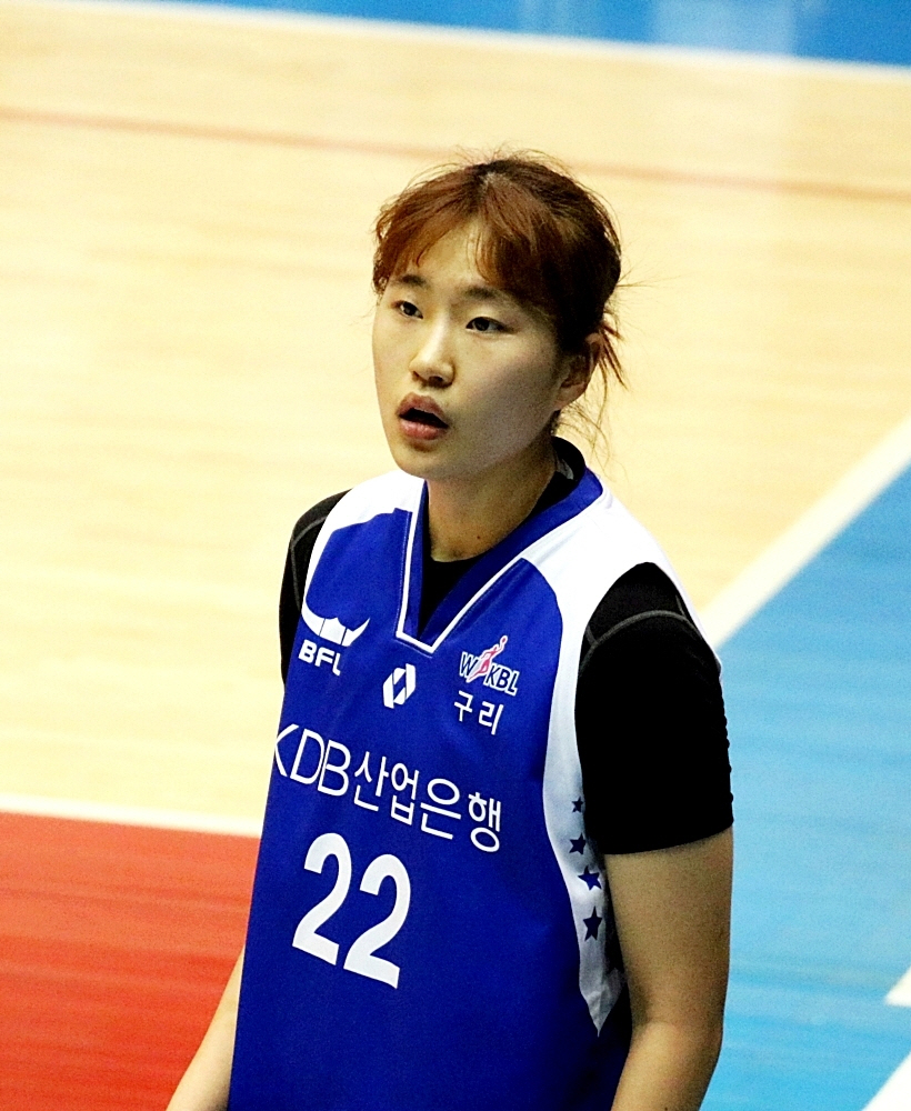 160205 여자농구 KDB생명 vs 신한은행 퓨처스